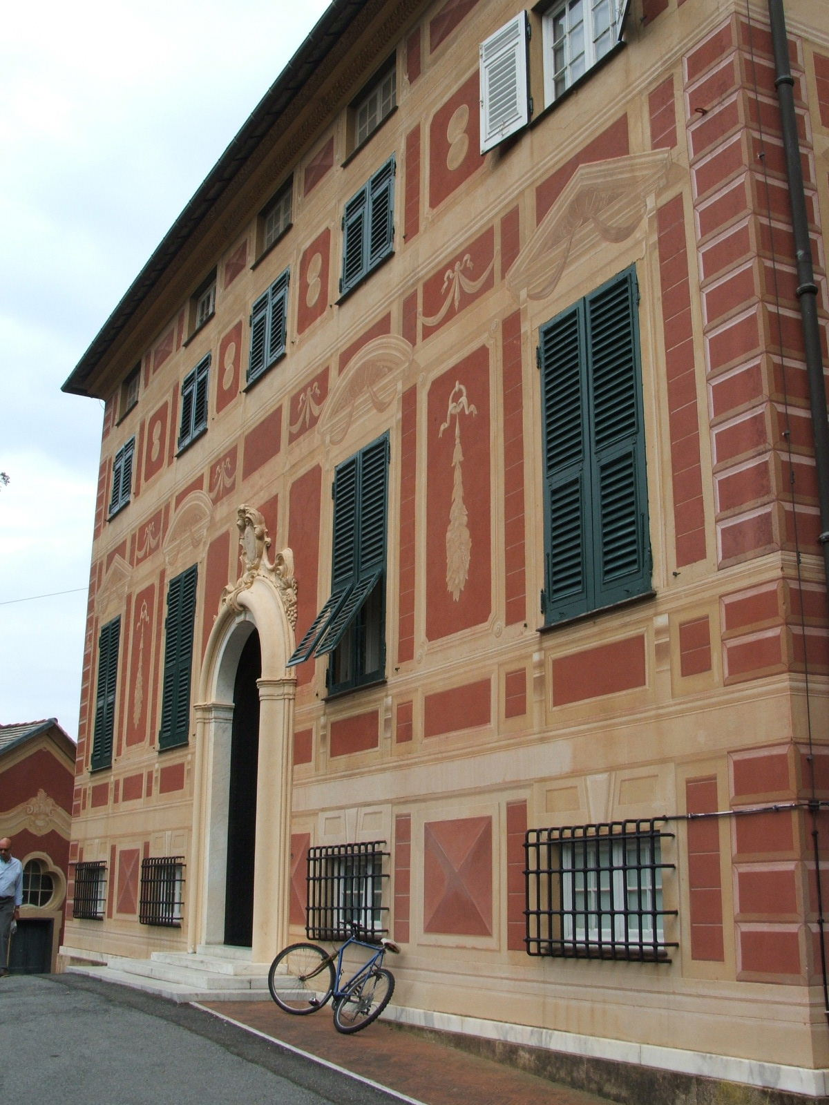 Villa Grimaldi Fassio, a Nervi, sede del museo Raccolte Frugone